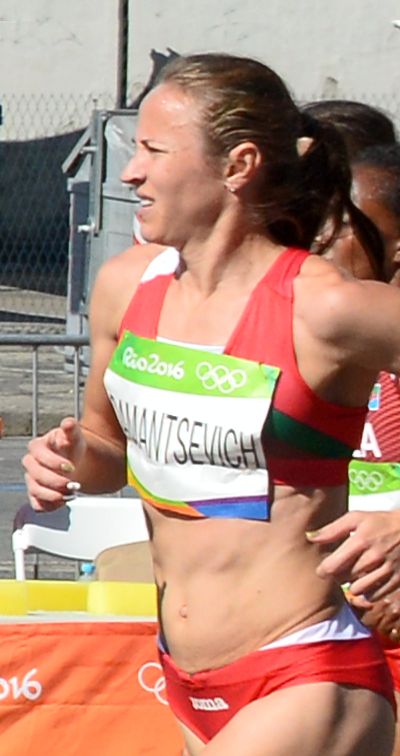 Passage du marathon des jeux olympiques de Rio 2016 dans le centre de Rio